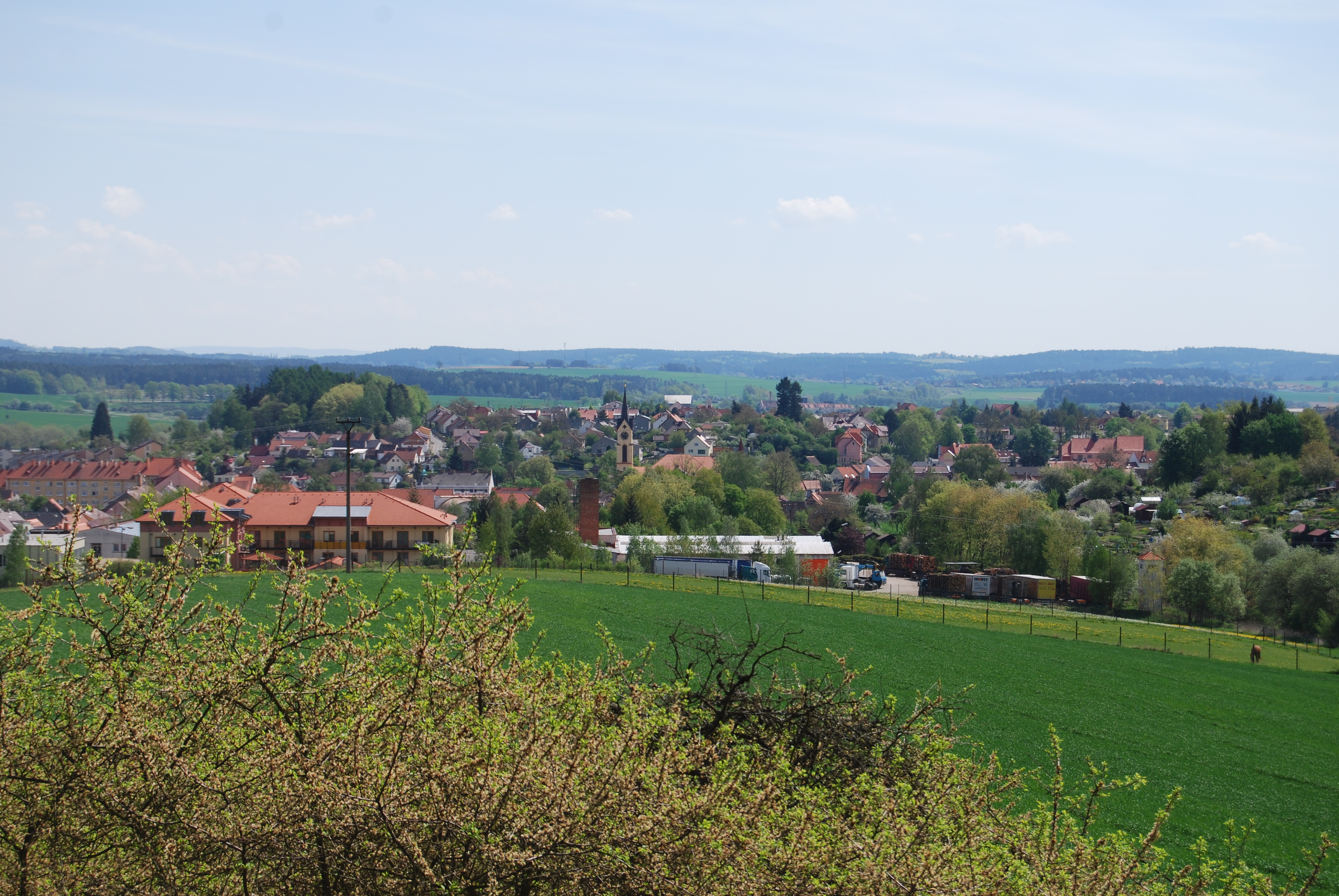 Pohled z Šibeného vrchu na město a kostel sv. Bartoloměje. Milevsko. Okres Písek. Česká republika.